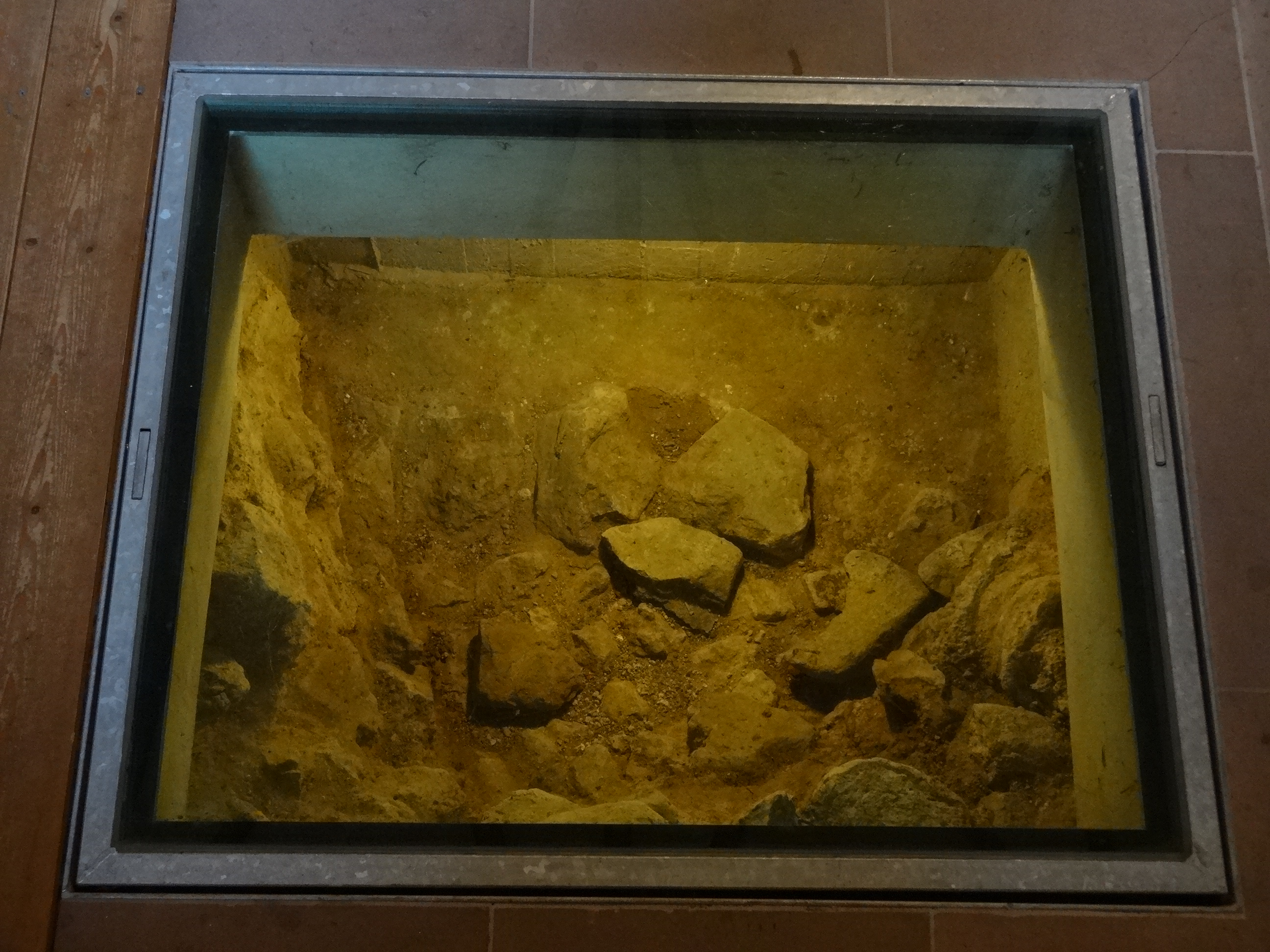 Evangelische Kirche Alten-Buseck